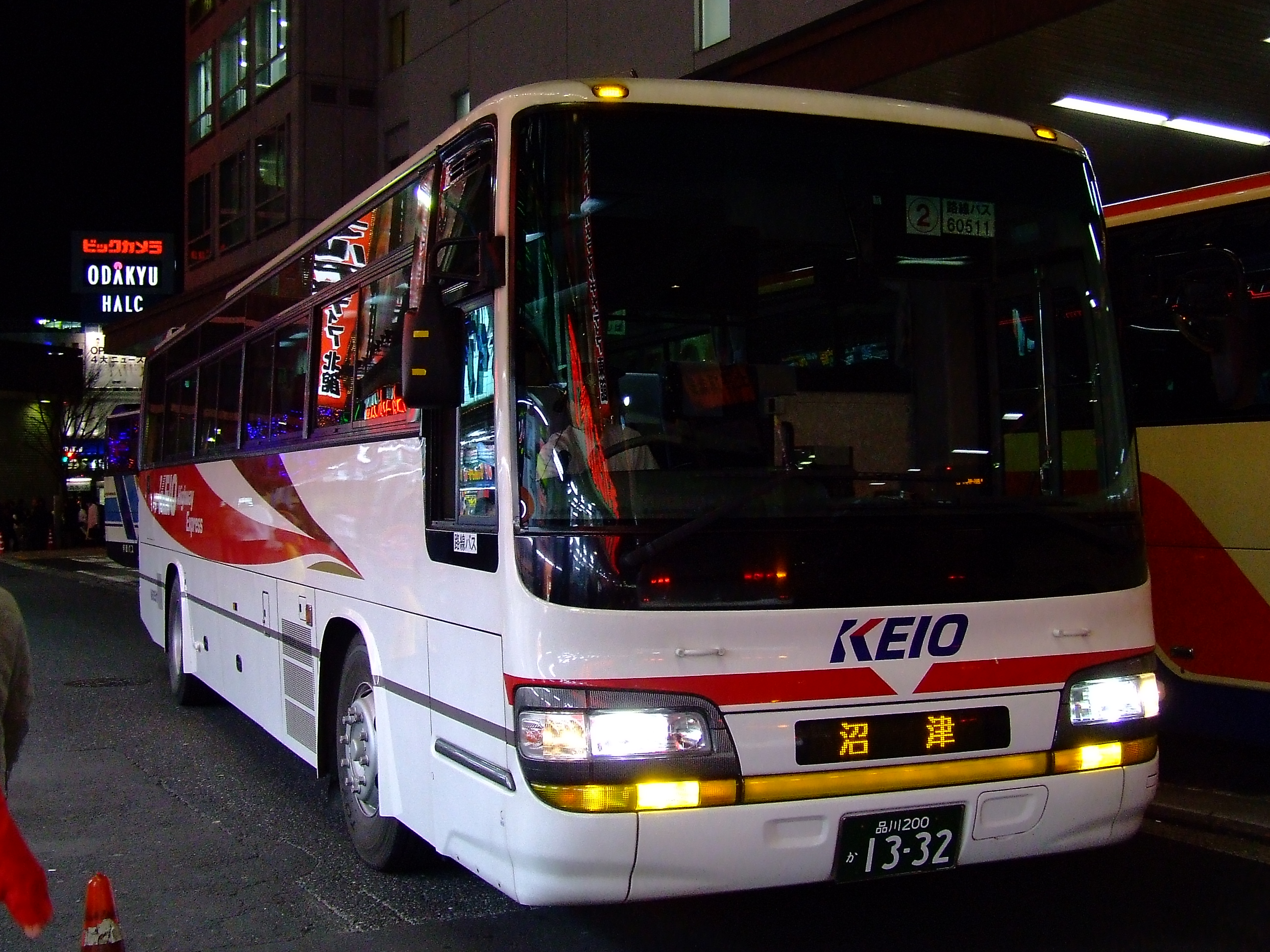 京王バス東の高速バス新宿～沼津線 新宿高速バスターミナル前にて